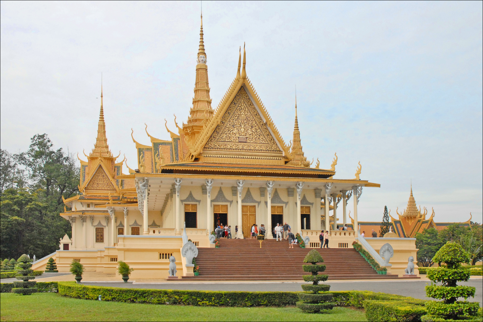 La Palais du Trône est dominé par un "prasat" pyramidal à visages inspiré du Bayon, il comprend la salle du couronnement et des cérémonies royales Autre photographie du palais du Trône L'album Flickr sur le Palais royal